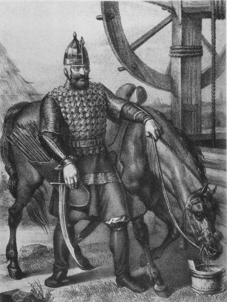 Русское вооружение с XIV до второй половины XVII столетия. Ратник в куяке и шапке медяной.